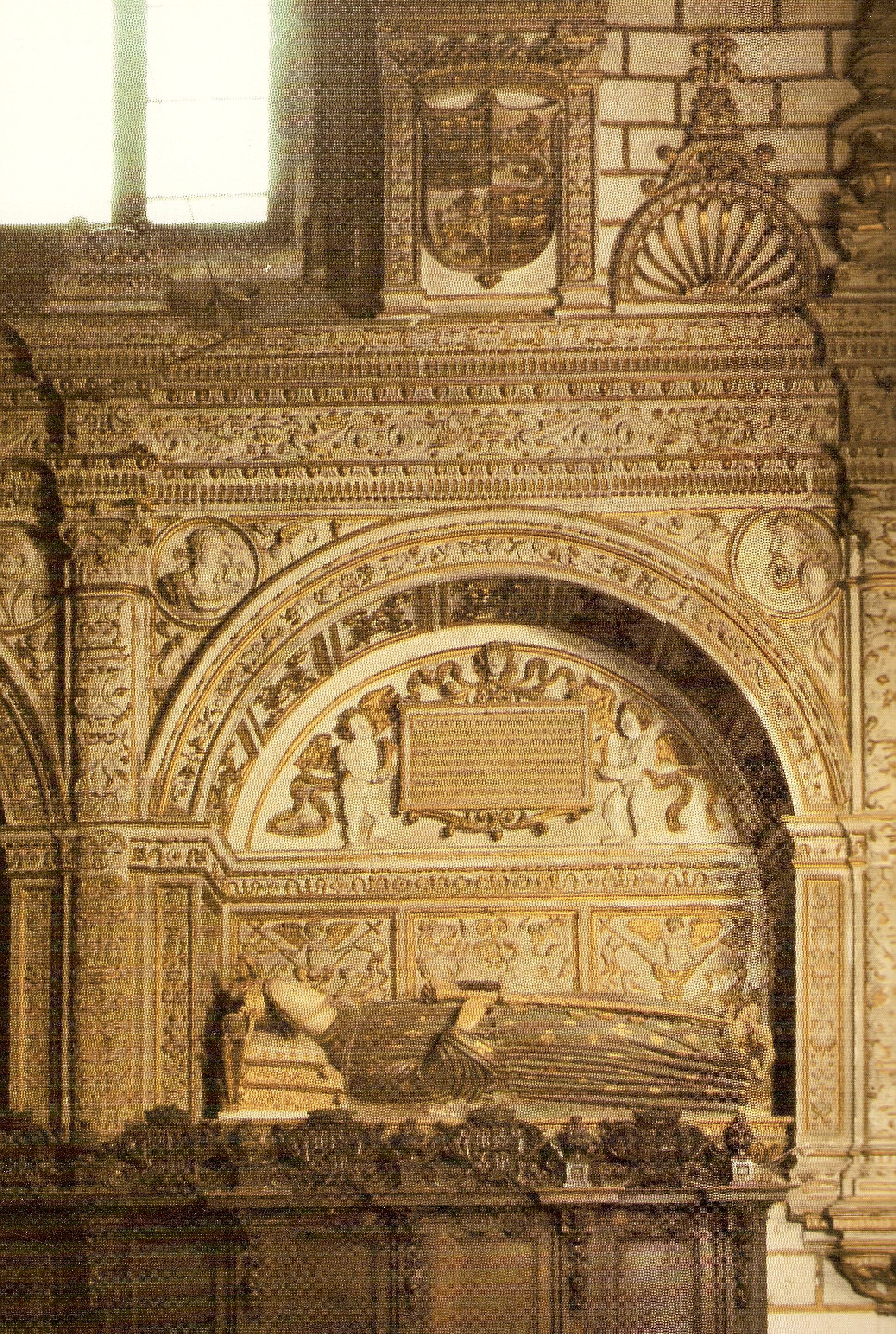 Sepulcro del rey Enrique III de Castilla (1379-1406). Se encuentra en la capilla de los Reyes Nuevos de la catedral de Toledo.